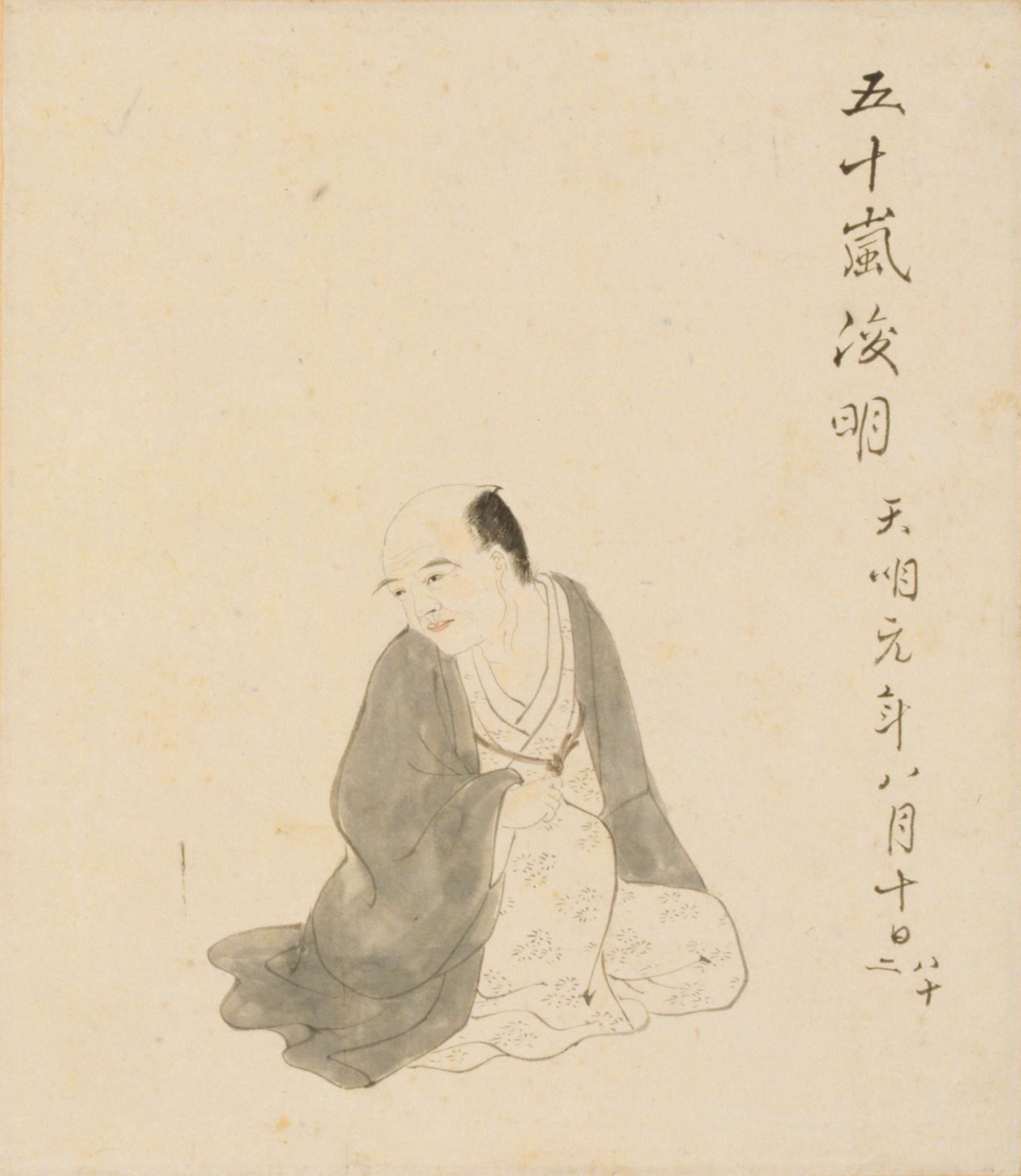 肖像集 ６. 塚本梅子・五十嵐浚明